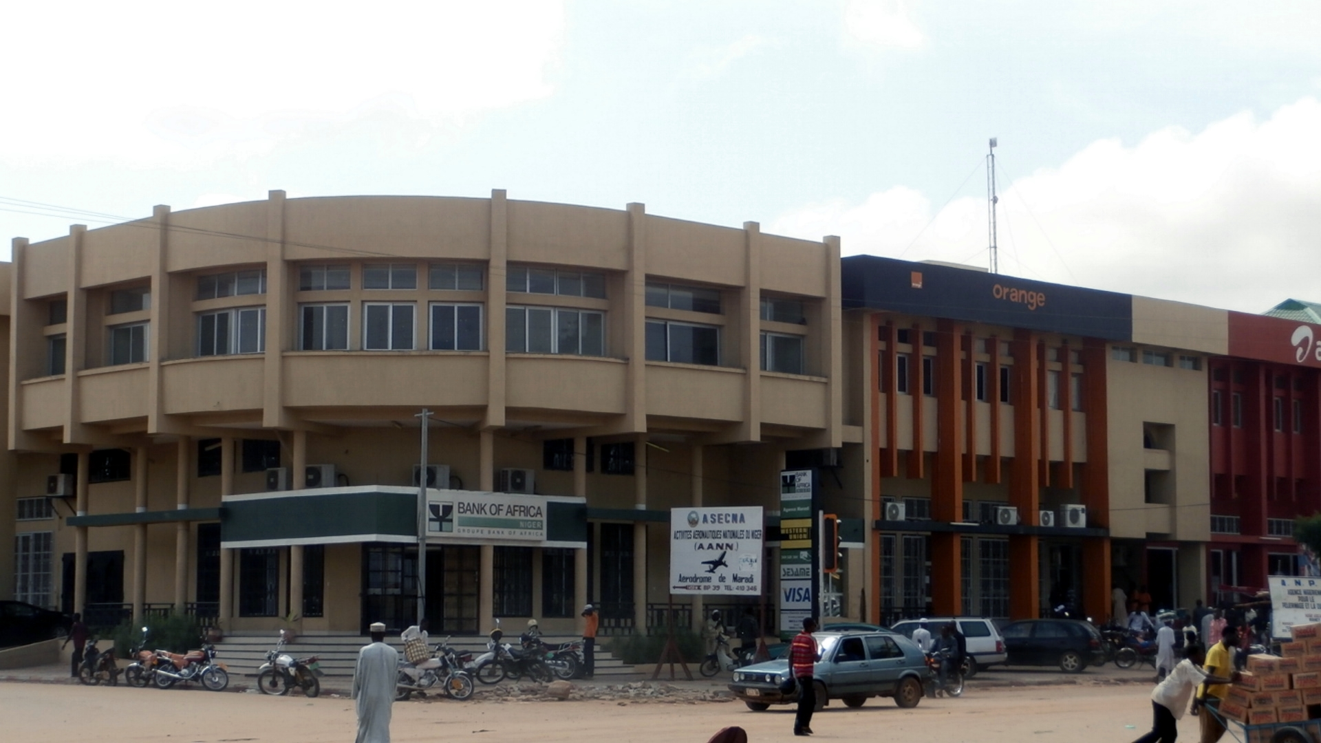 La ville de Maradi